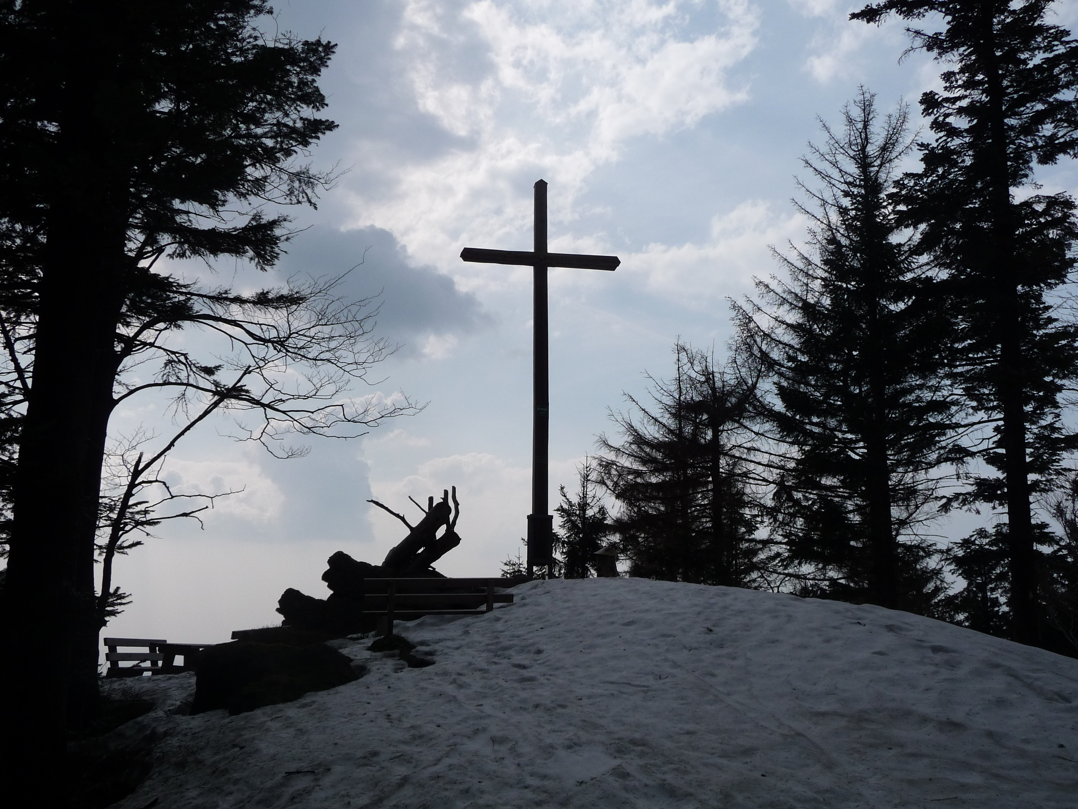 Gipfel Knogl